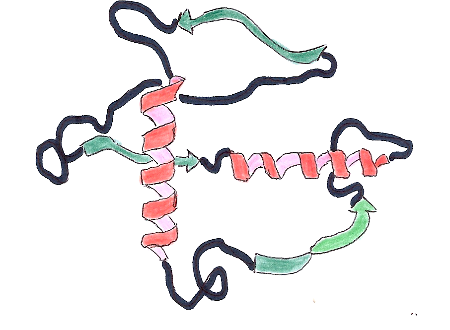 Esquema d'una proteïna amb plans beta i hèlix alfa